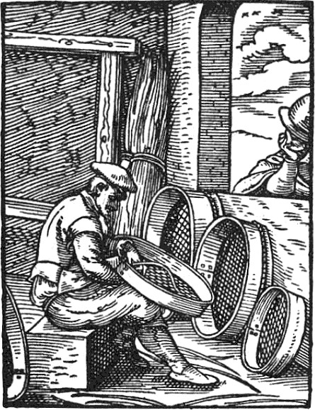 Sieber